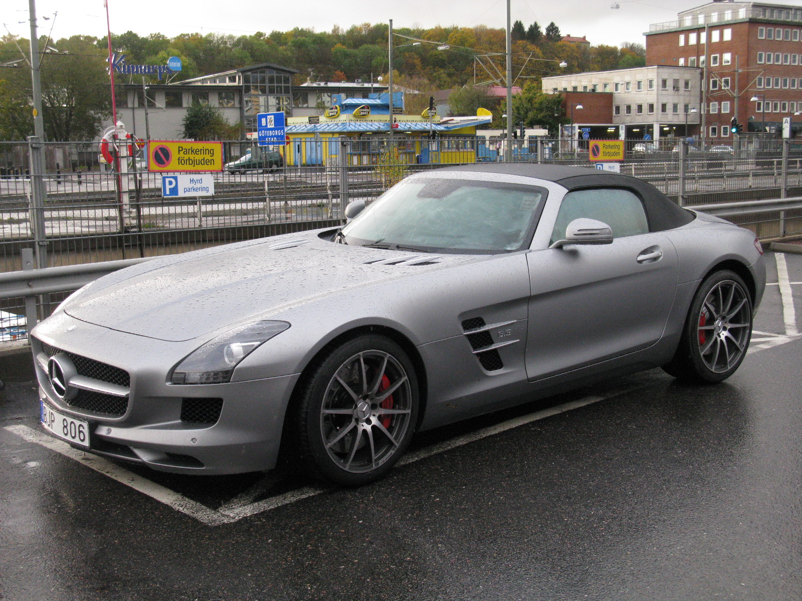 Mercedes-Benz SLS AMG Roadster